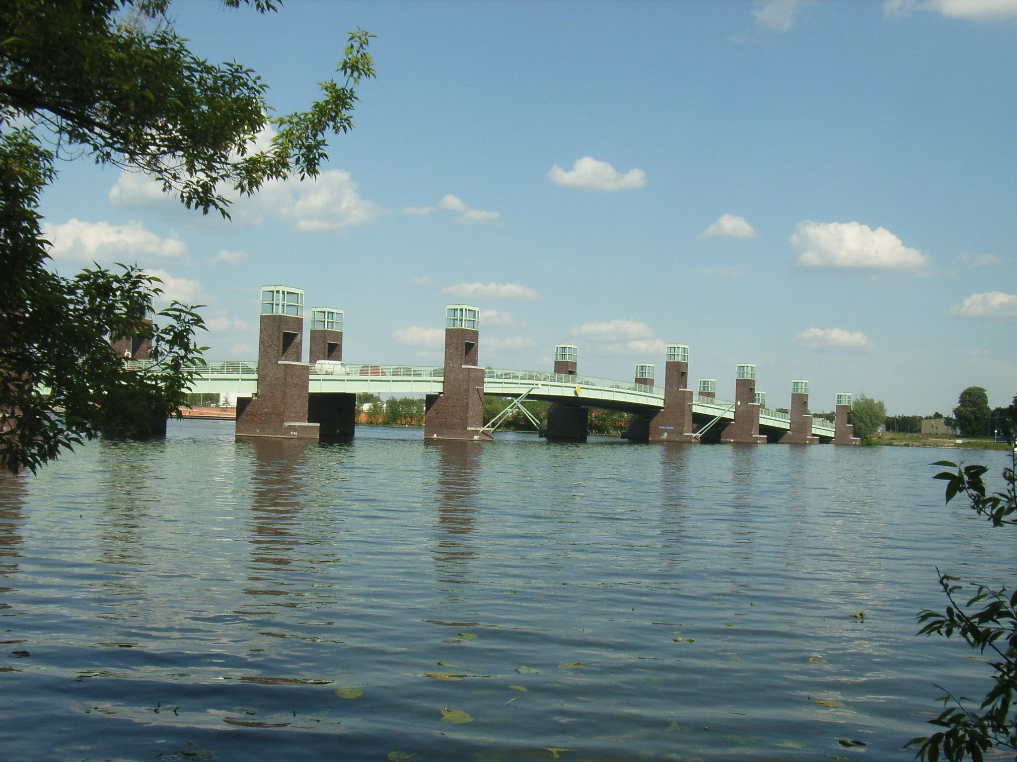 Spandauer-See-Brücke Berlin